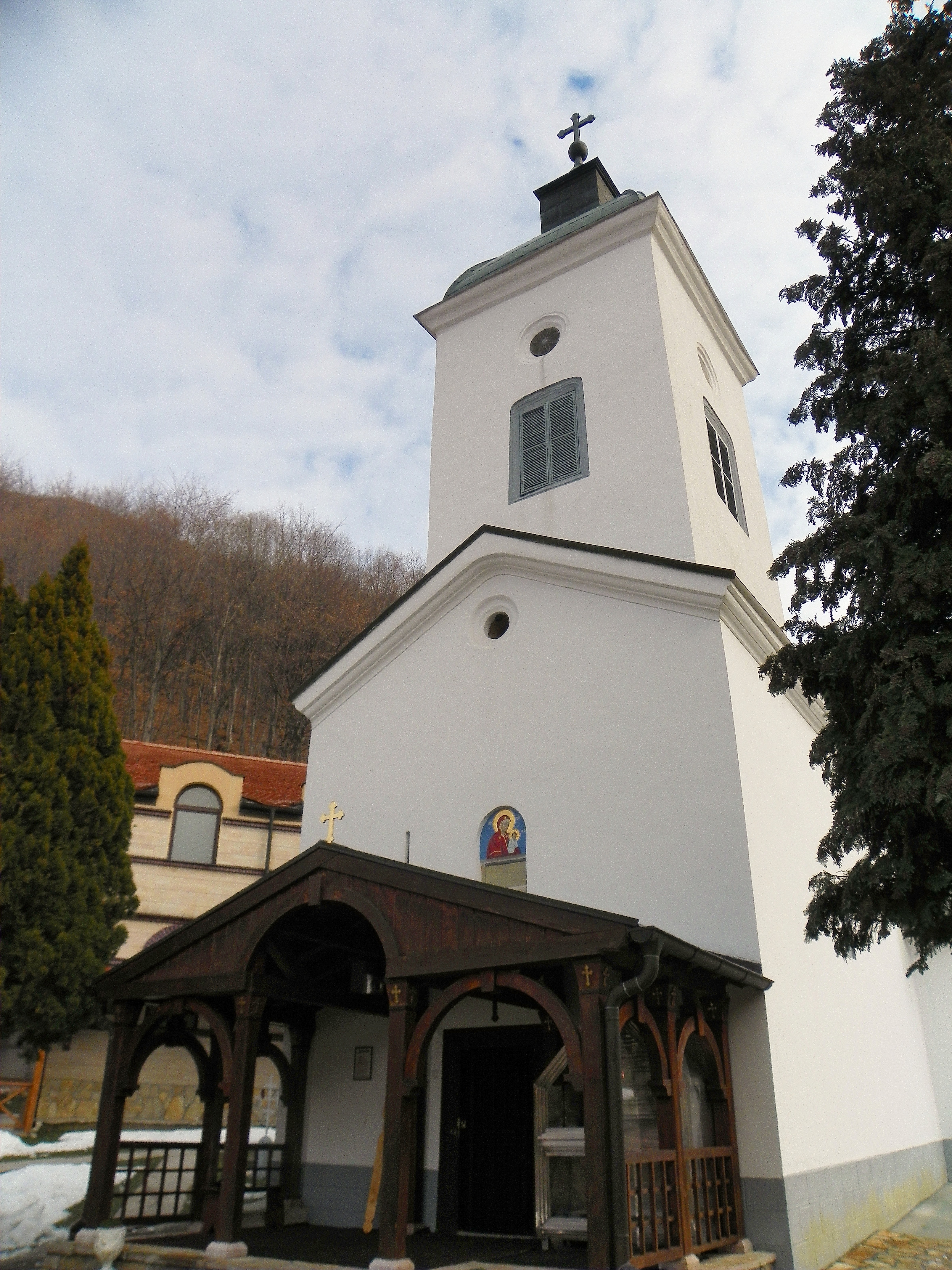 Манастир Сретење се налази у Дучаловићима, месту у општини Лучани, под самим врхом планине Овчар на 800 метара надморске висине. Манастир Сретење представља непокретно културно добро као споменик културе од великог значаја.